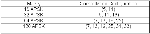 taula per a apsk